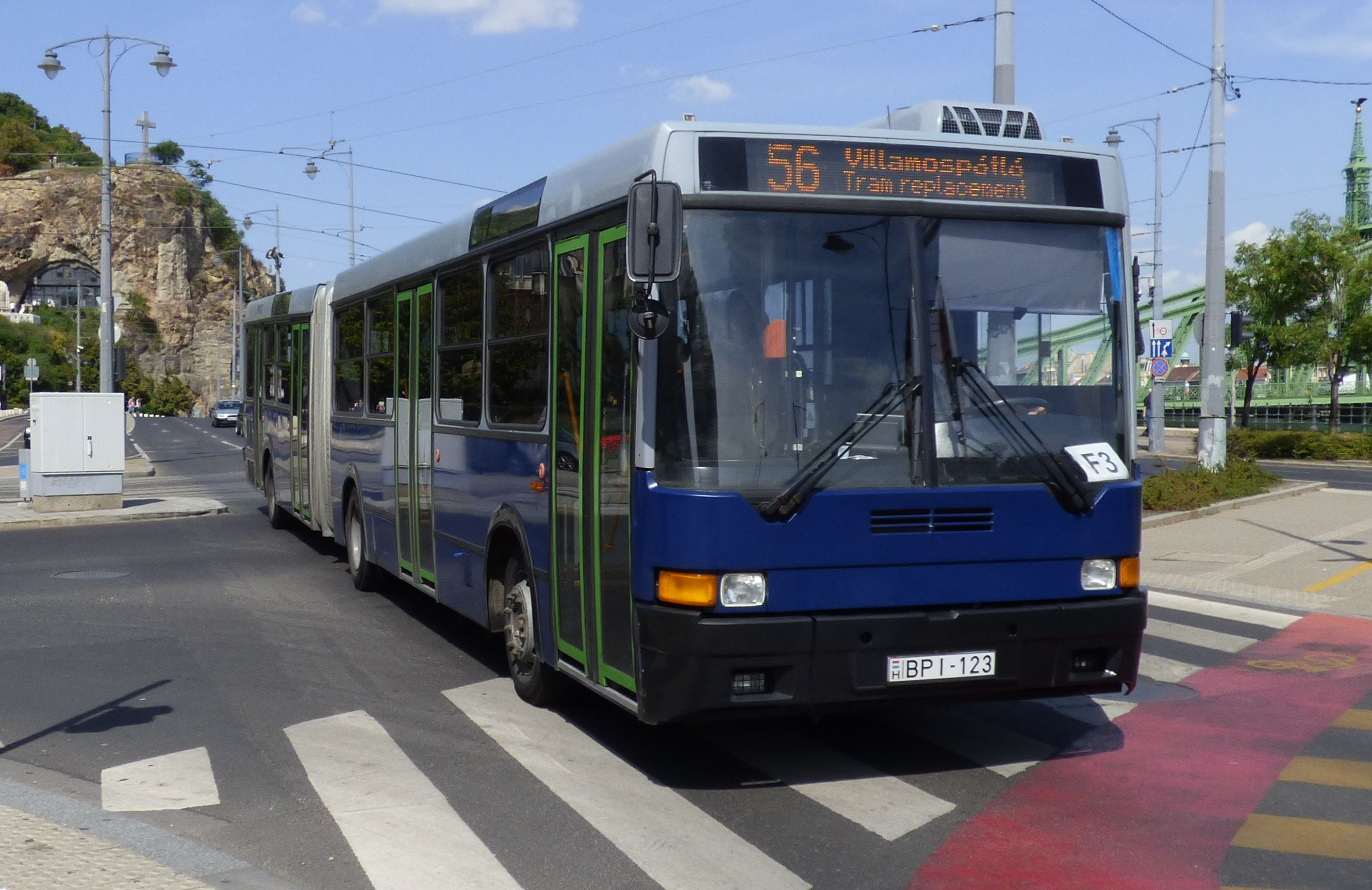 56-os jelzésű villamospótló Ikarus 435-ös busz a Szent Gellért téren (frsz: BPI-123)